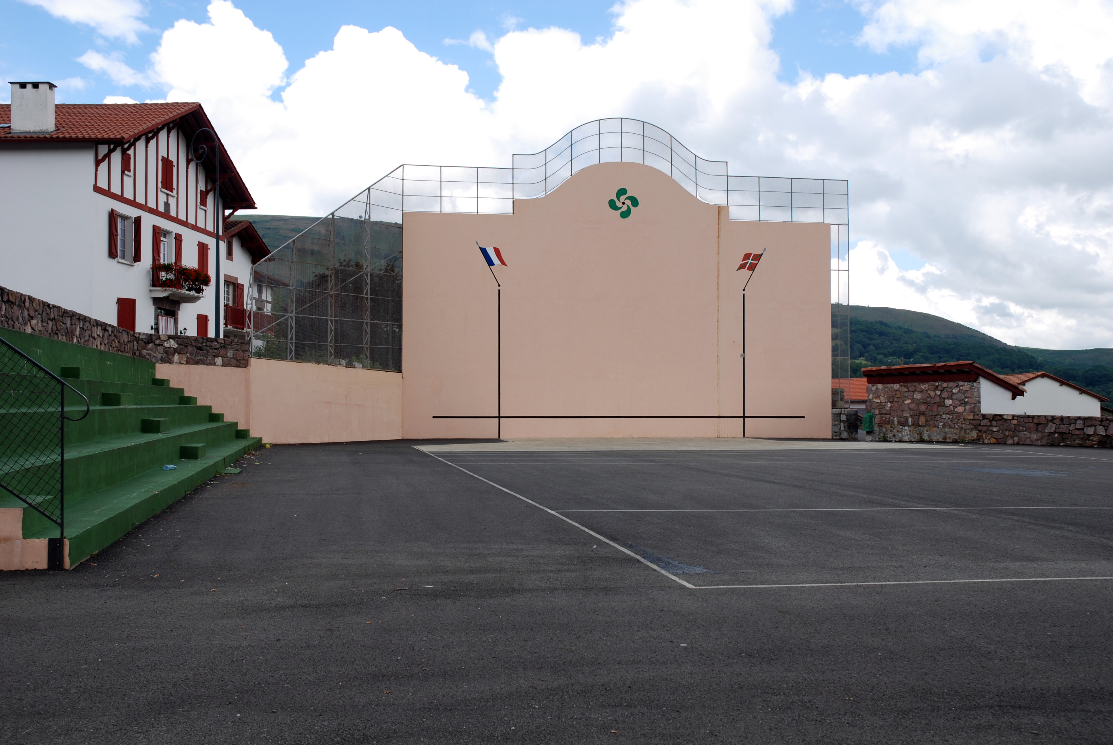 Fronton place libre d'Anhaux